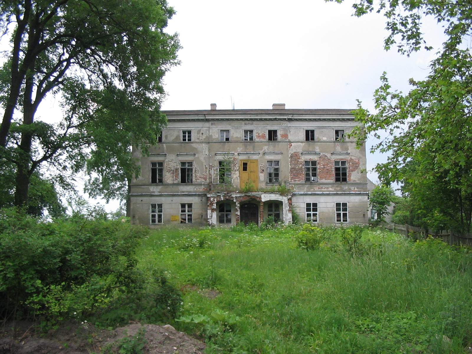 Świdnica (woj. lubuskie) Ruiny dworu. Budynek rozebrany w 2005 roku ;( Author: Mohylek 11:16, 6 November 2006 (UTC)